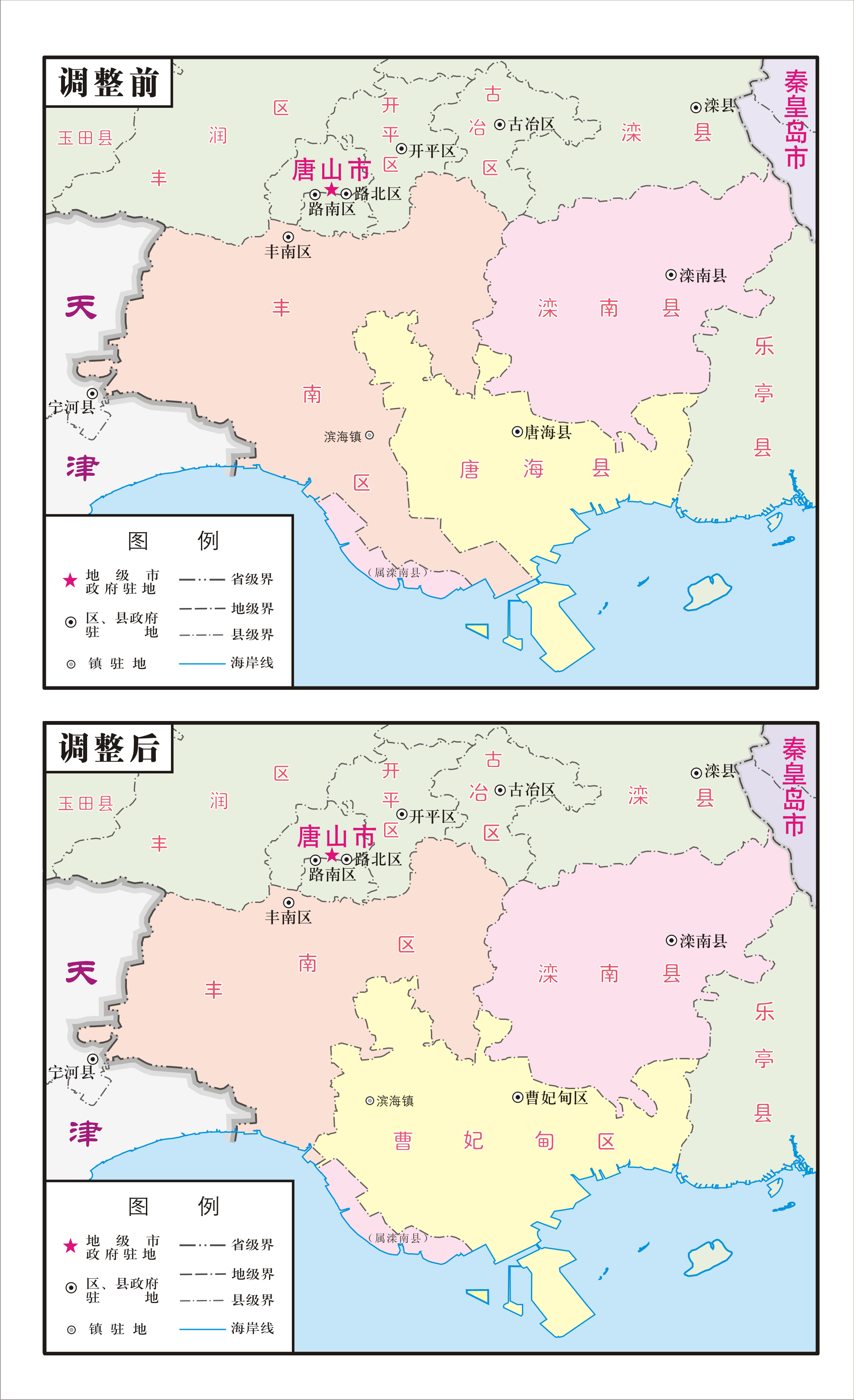 中文（中国大陆）: 河北省唐山市部分行政区划调整前后示意图